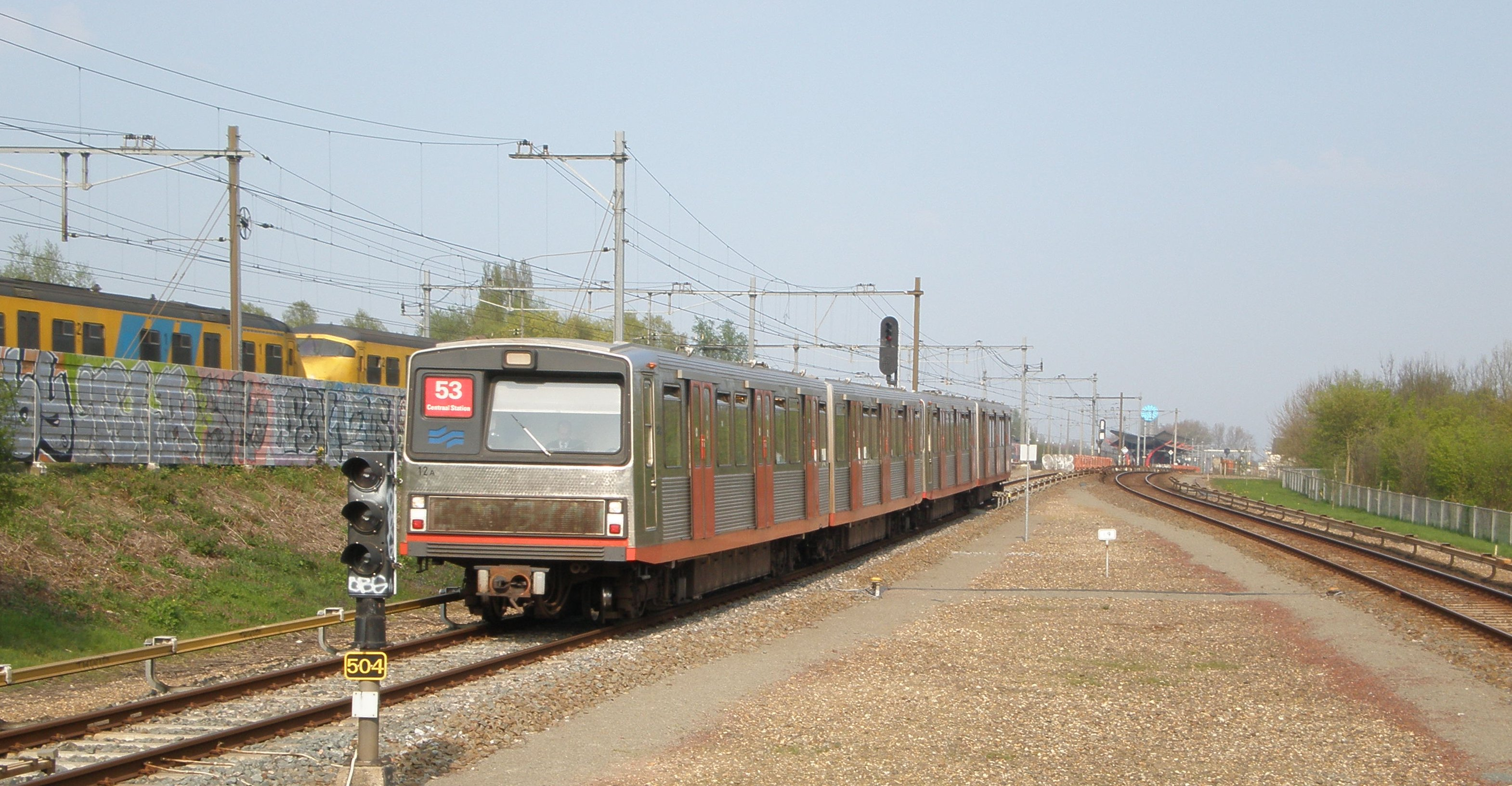 Metro Amsterdam: Zug LHB M2 vor dem U-Bahnhof Venserpolder